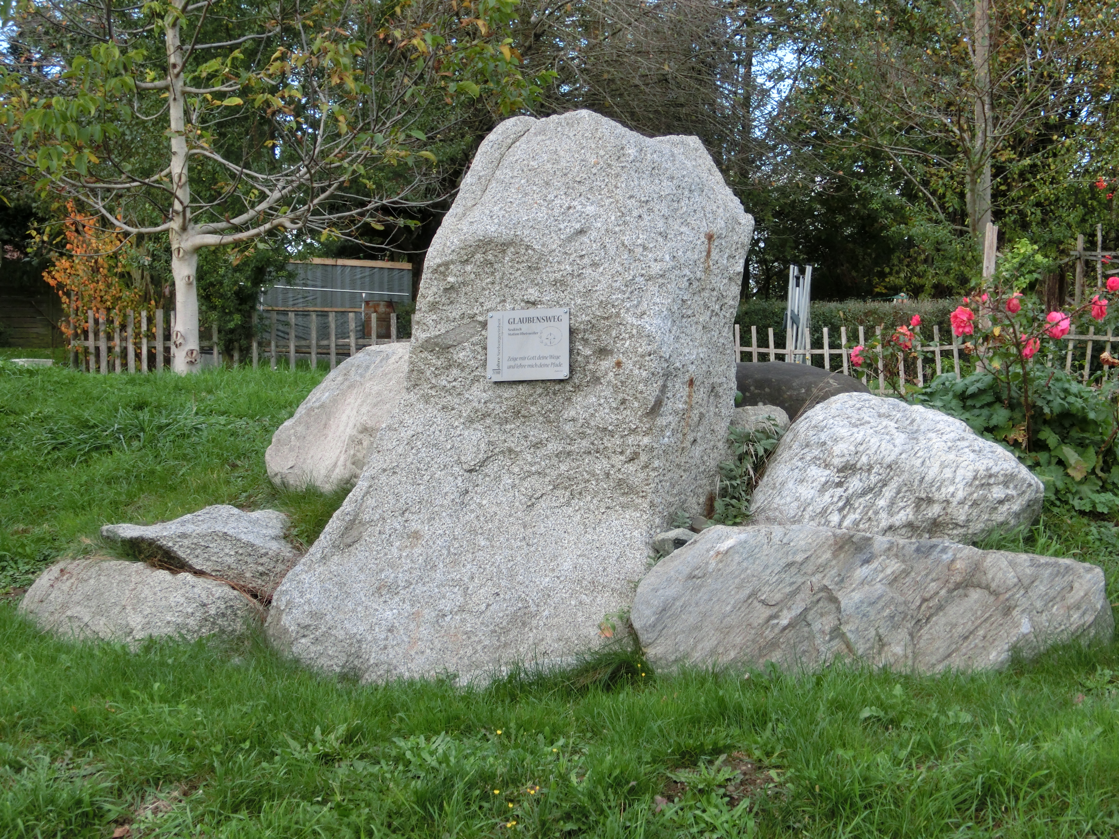 Deutschland - Baden-Württmberg - Bodenseekreis - Neukirch - Uhetsweiler: Station des Glaubenswegs der Seelsorgeeinheit Argental; Tafel mit Aufschrift "Zeige mir Gott deine Wege und lehre mich deine Pfade" (Psalm 25, 4)